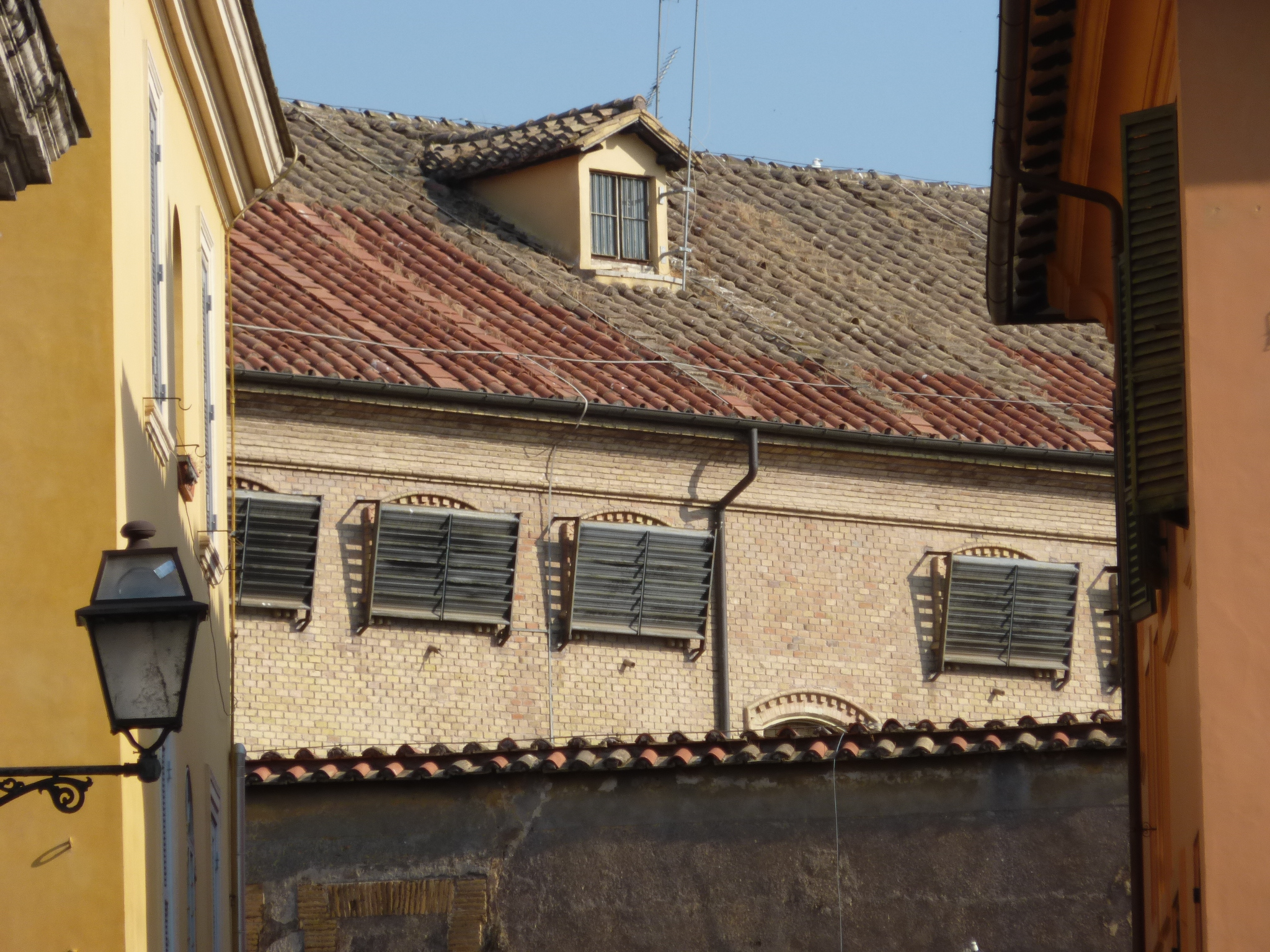 Roma, carcere di Regina Coeli, finestre a bocca di lupo al piano più alto, viste dal vicolo S. Francesco di Sales.